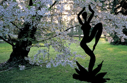 steel sculpture